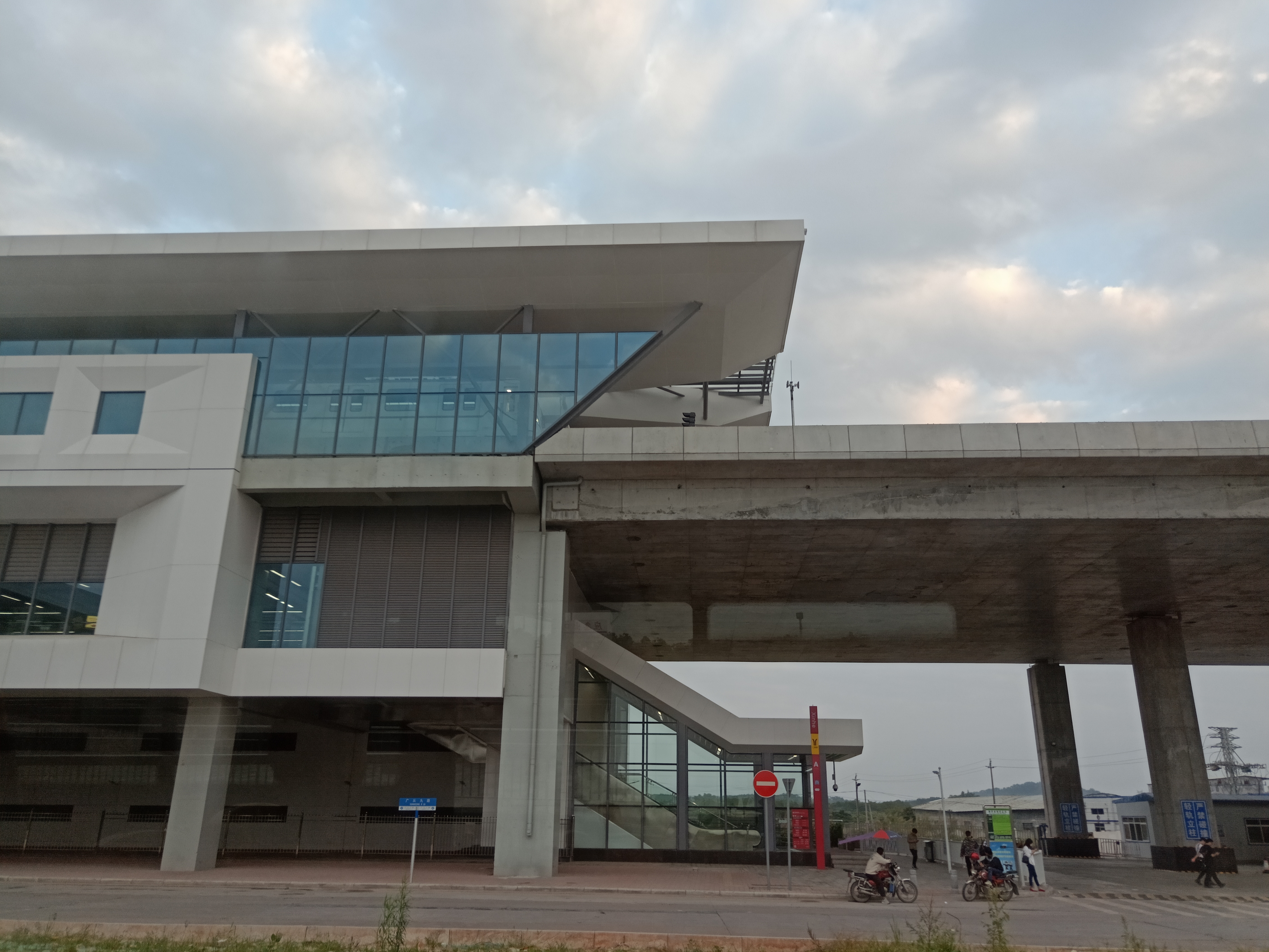 粵語: 2018年11月5號，喺廣州地鐵14號綫嘅新和站，從車站出面望去2號月台附近，發現有14號綫啲車喺度搞主綫調試。